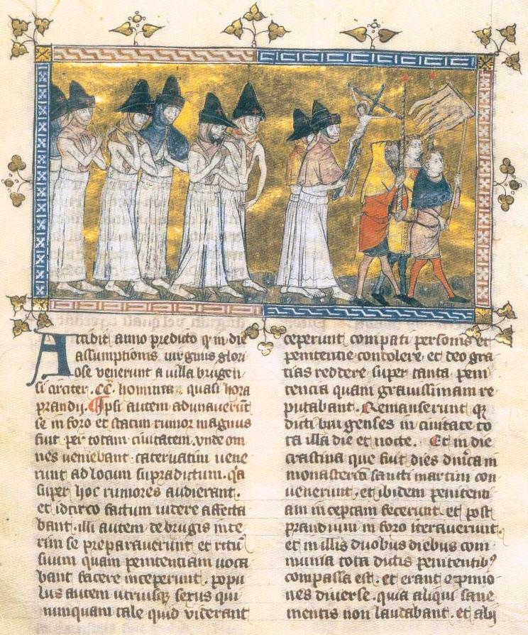 Darstellung der Geißlerzüge, um 1350, Chronik von Gilles Li Muisis, fol. 16v Bibliothèque Royale de Belgique, Brüssel.